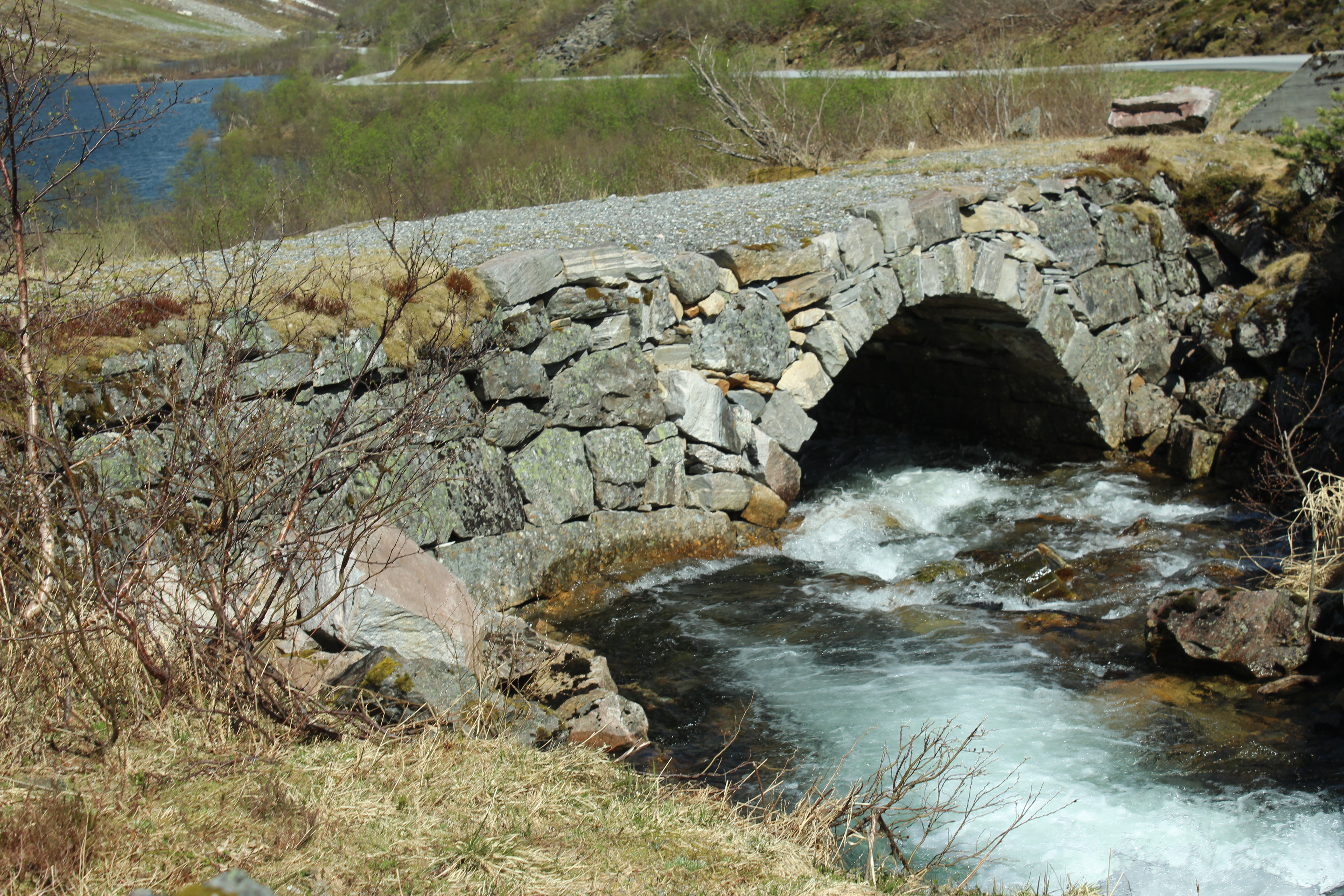 Geilskredbrua